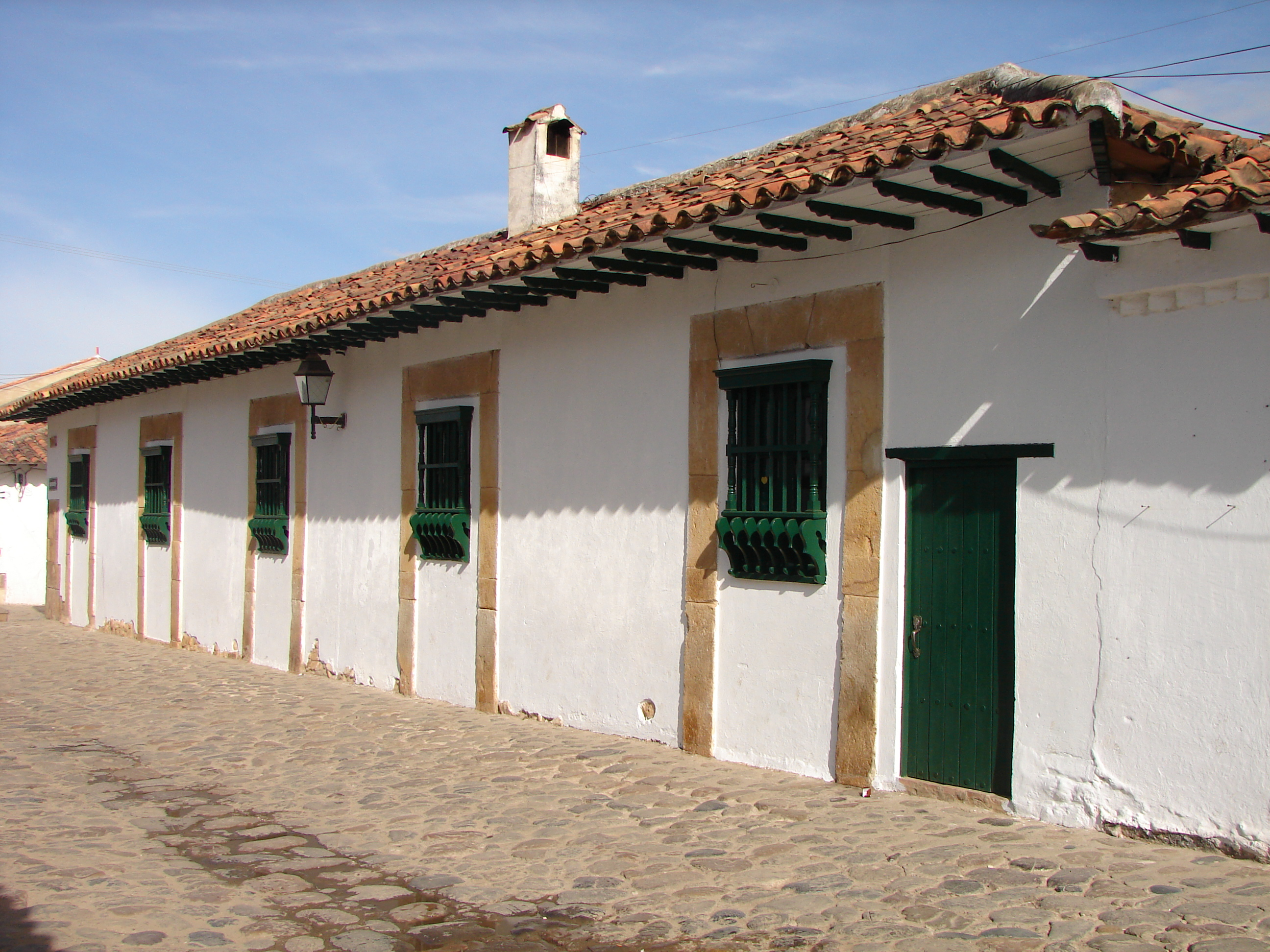 casa colonial tipo español en Villa de Leyva